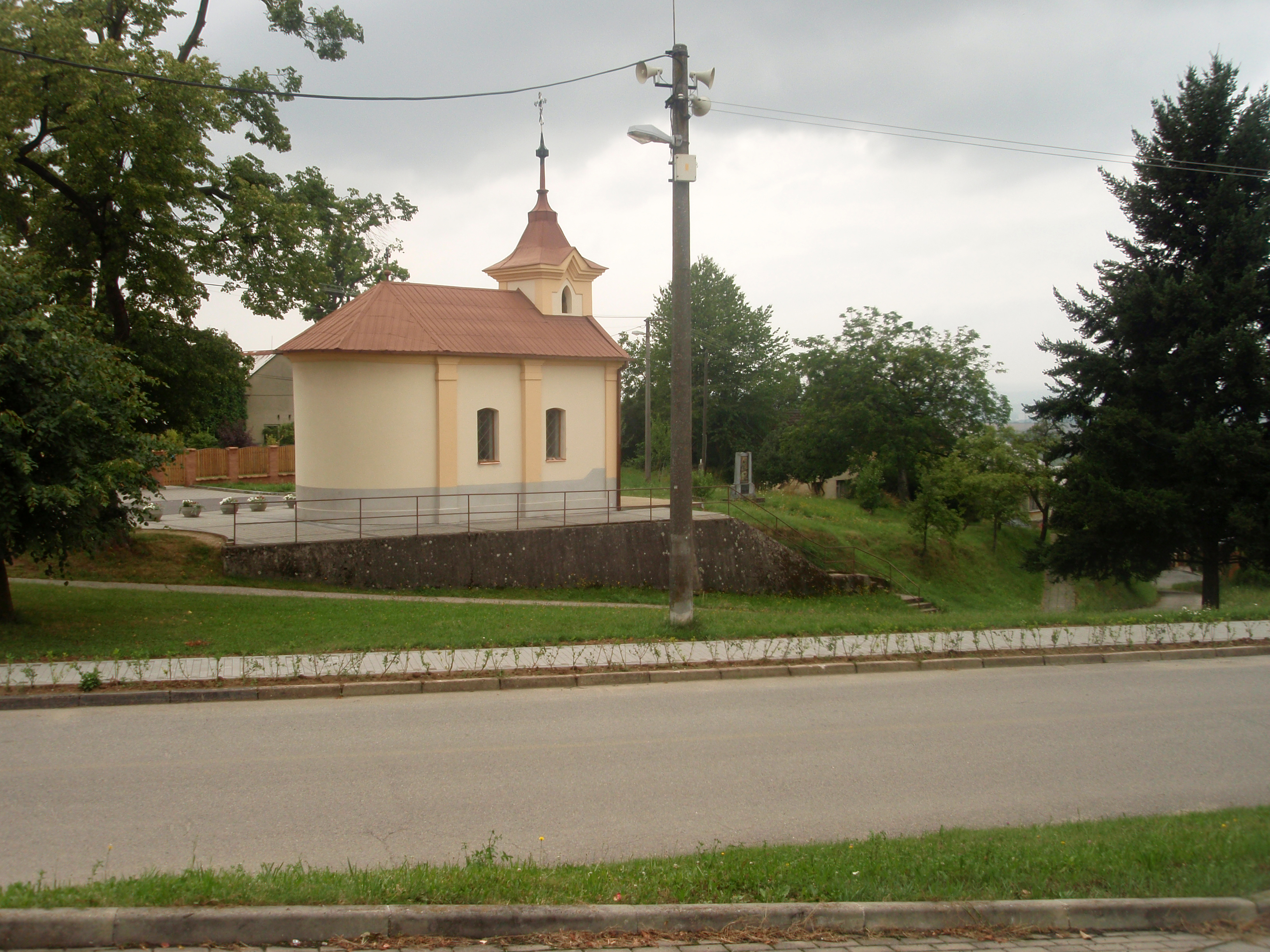 Náves s kapličkou v Hostišové